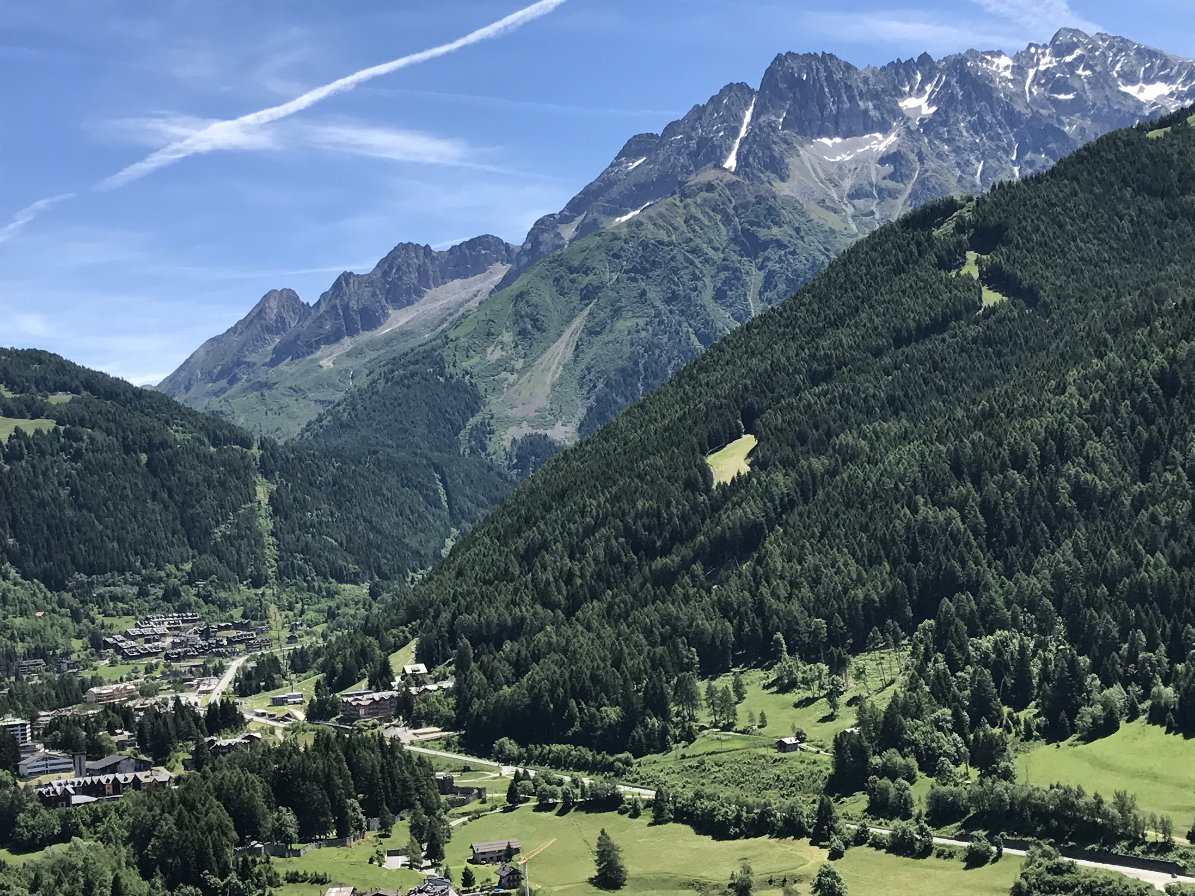 ponte di legno visto da temù